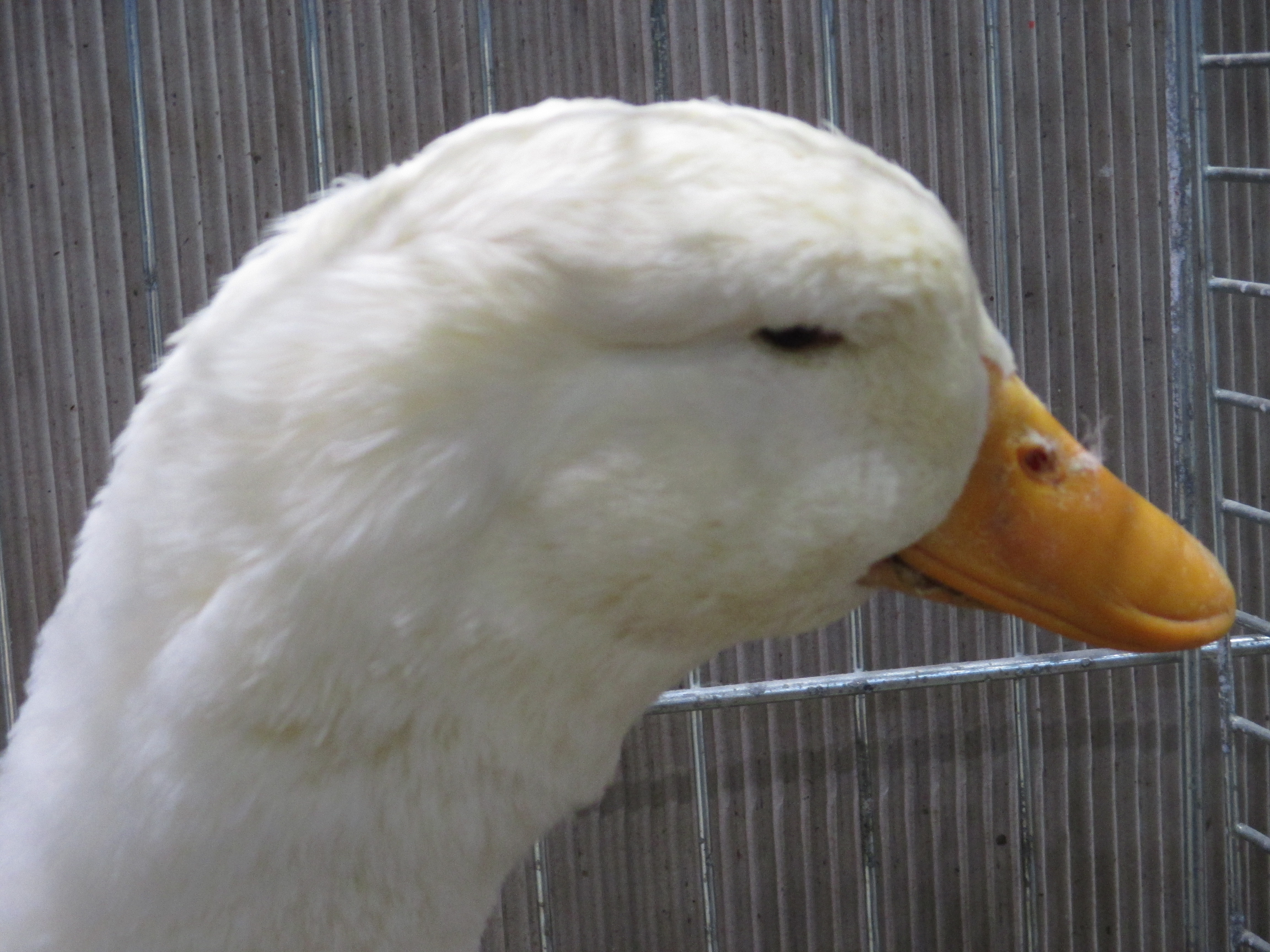 Kopfstudie Deutsche Pekingente